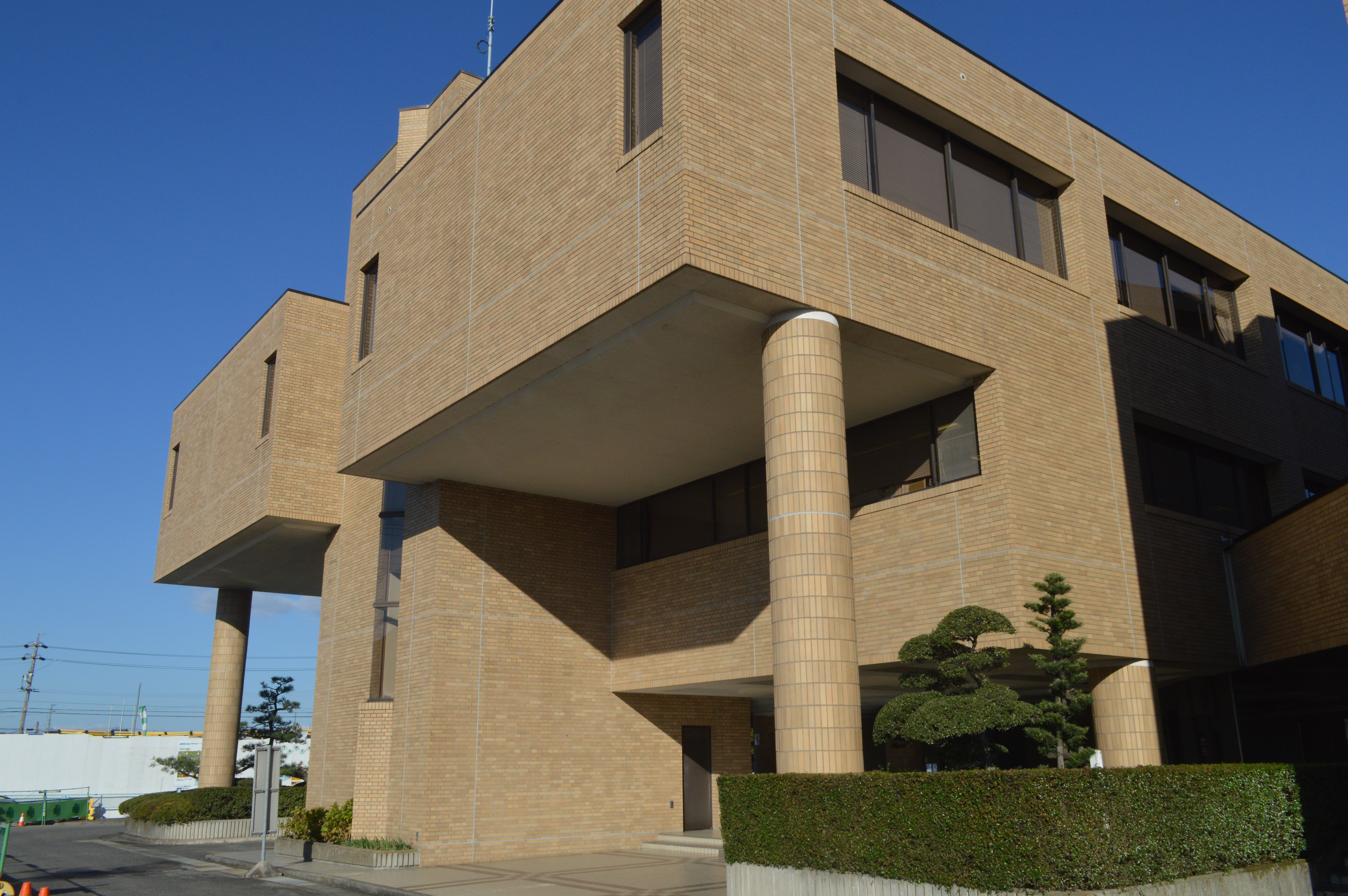 愛西市佐織公民館。愛西市佐織図書館などが入っている。